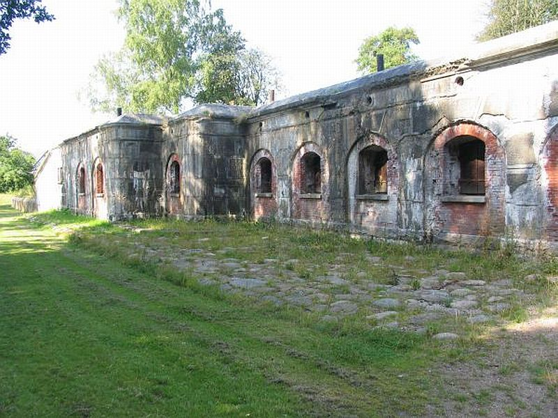 Fortunfortet, struben